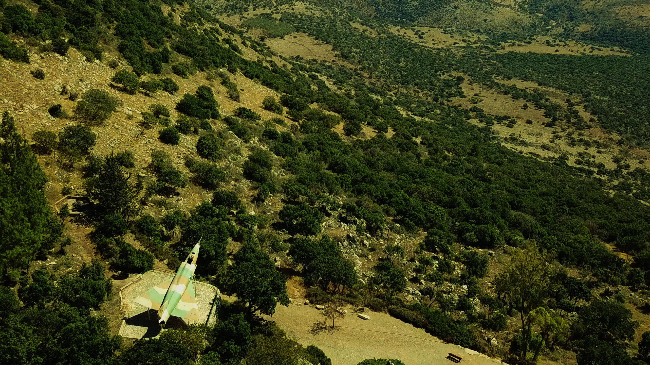 (מצפה מנחם -הנמצא במושב אמירים (בגליל העליון אנדרטת מנחם קשטן מהווה את הבסיס למצפה מנחם אשר ממנה ניתן לראות מחלקו המרכזי של רמת הגולן לאורך קו הנוף עד לאיזור מערבית .לכנרת,ואיזור צומת גולני